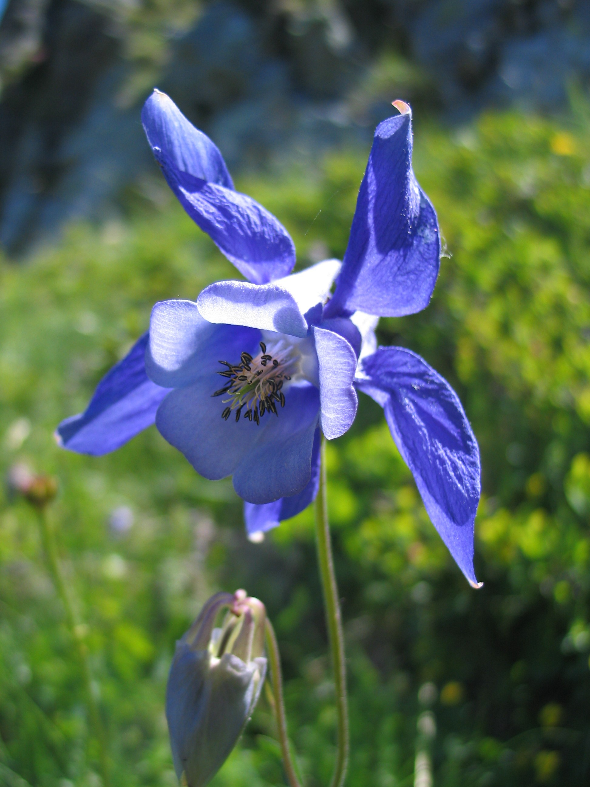 Aquilegia alpina, Lac Forchou, Belledone, Isere, Francia